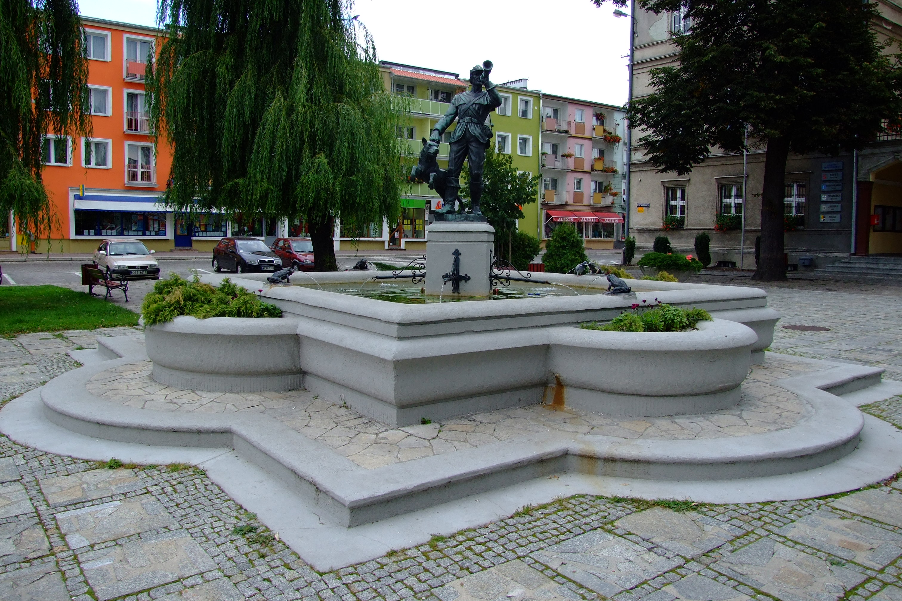 Pomnik myśliwca na rynku w Strzelcach Opolskich